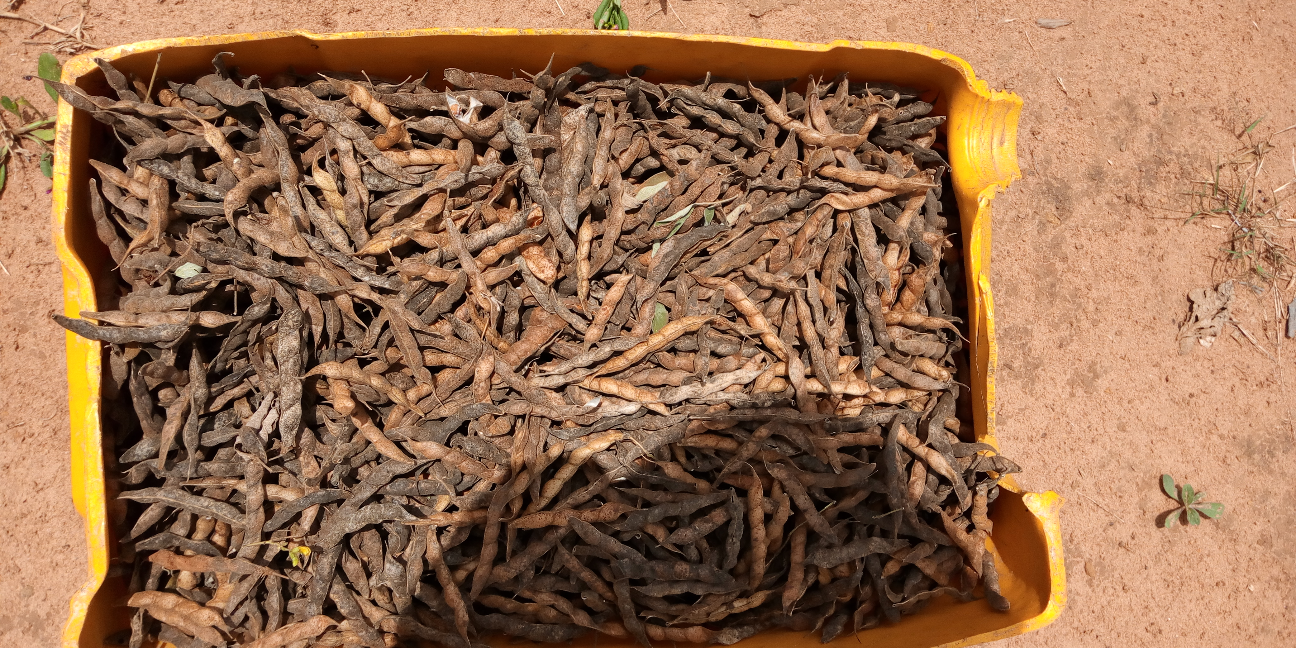 Poids d’angole murs dans les gousses dépose dans 1 plastiques jaune au Bénin